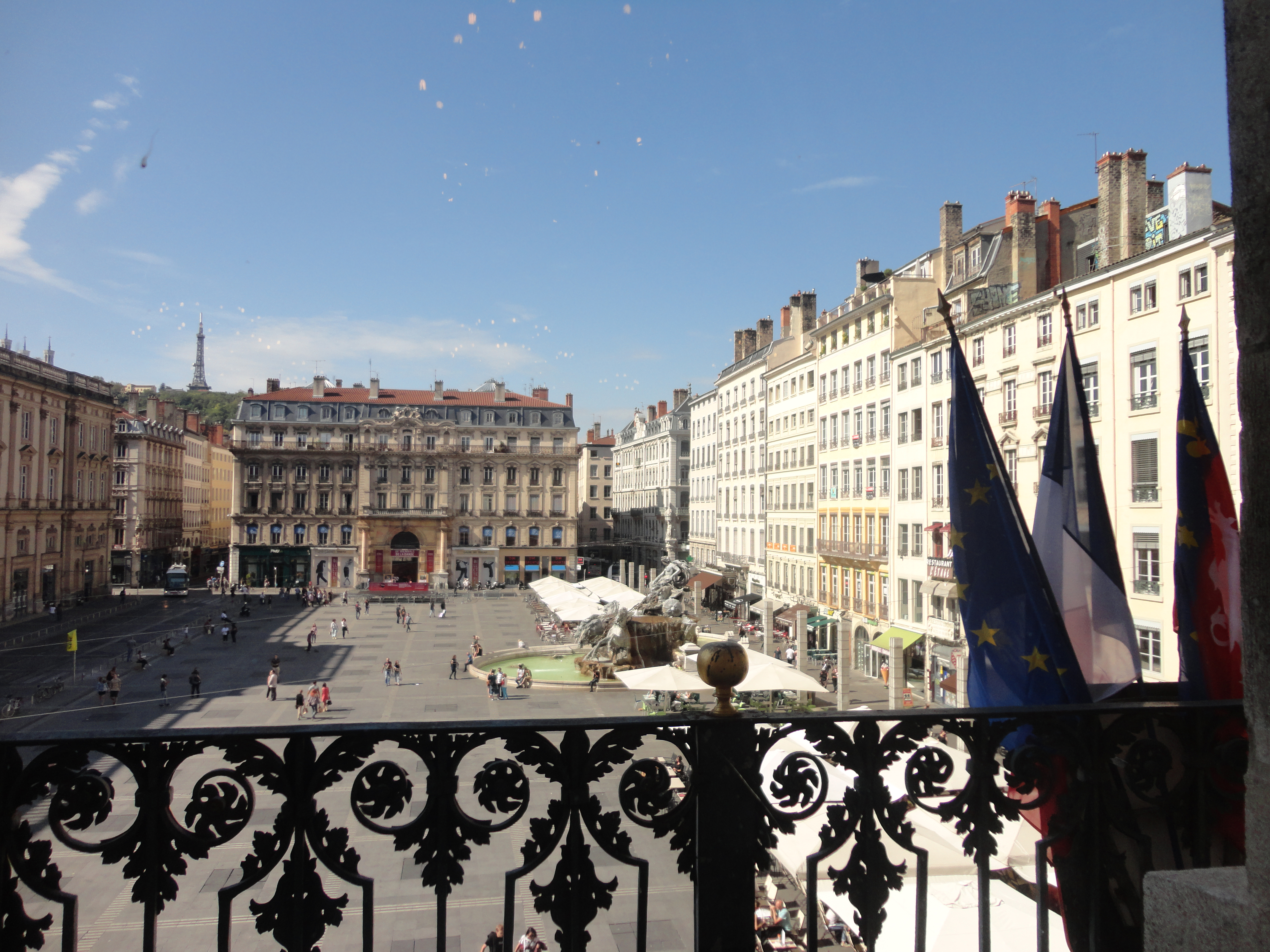 Place des Terreaux vue depuis de l'Hôtel de ville de Lyon (2014) .